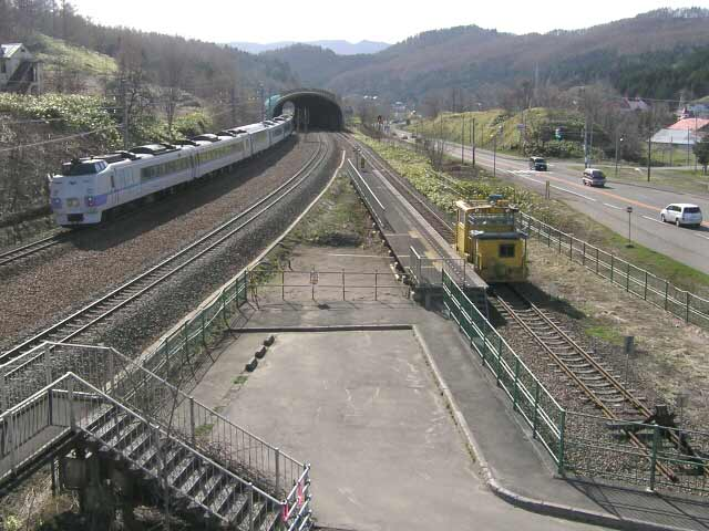 楓信号場。 通過列車は札幌行特急とかち。 工事中の柵の向こう側にかつての駅舎があった。 撮影場所：楓信号所近くの跨線橋上より